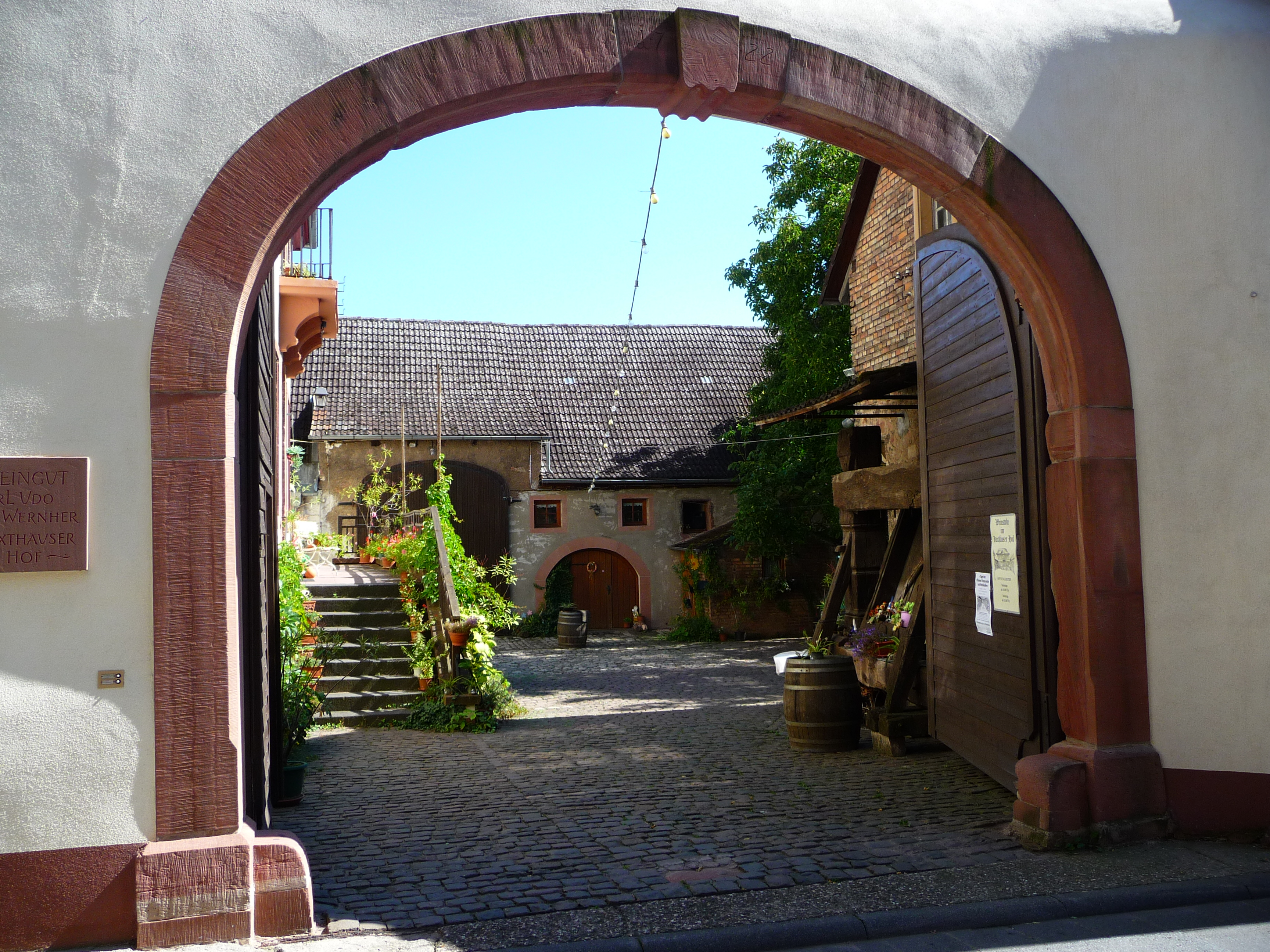 Haxthäuser Hof (A. D. 1612) - Heute: Weingut Carl Udo Wernher in Nierstein (Rheinland-Pfalz, Deutschland) Das barocke Herrenhaus ist mit Mansarddach versehen. An der Hoffront befindet sich ein giebelgekrönter Mittelrisalit. Der Hof wurde 1670 von der Familie Rodenstein an die Adelsfamilie von Haxthausen übergeben. Ab 1700 gelangte er durch eine Heirat in den Besitz des Freiherrn von Stockheim, ab 1753 wieder in den der Freiherrn von Haxthausen. Seit 1804 ist das Gebäudeensemble im Besitz der Familie Wernher.